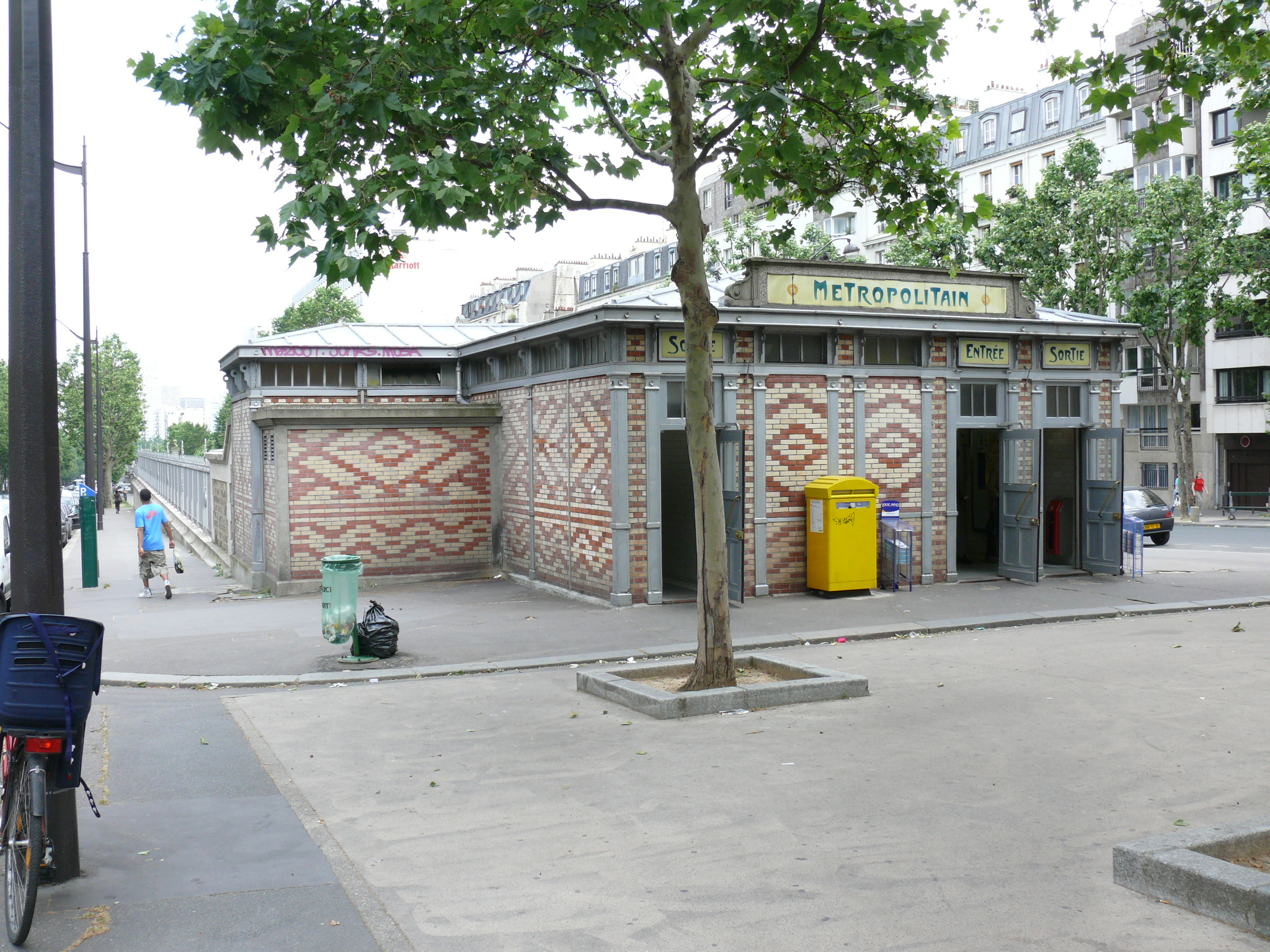 Station de métro Saint-Jacques à Paris